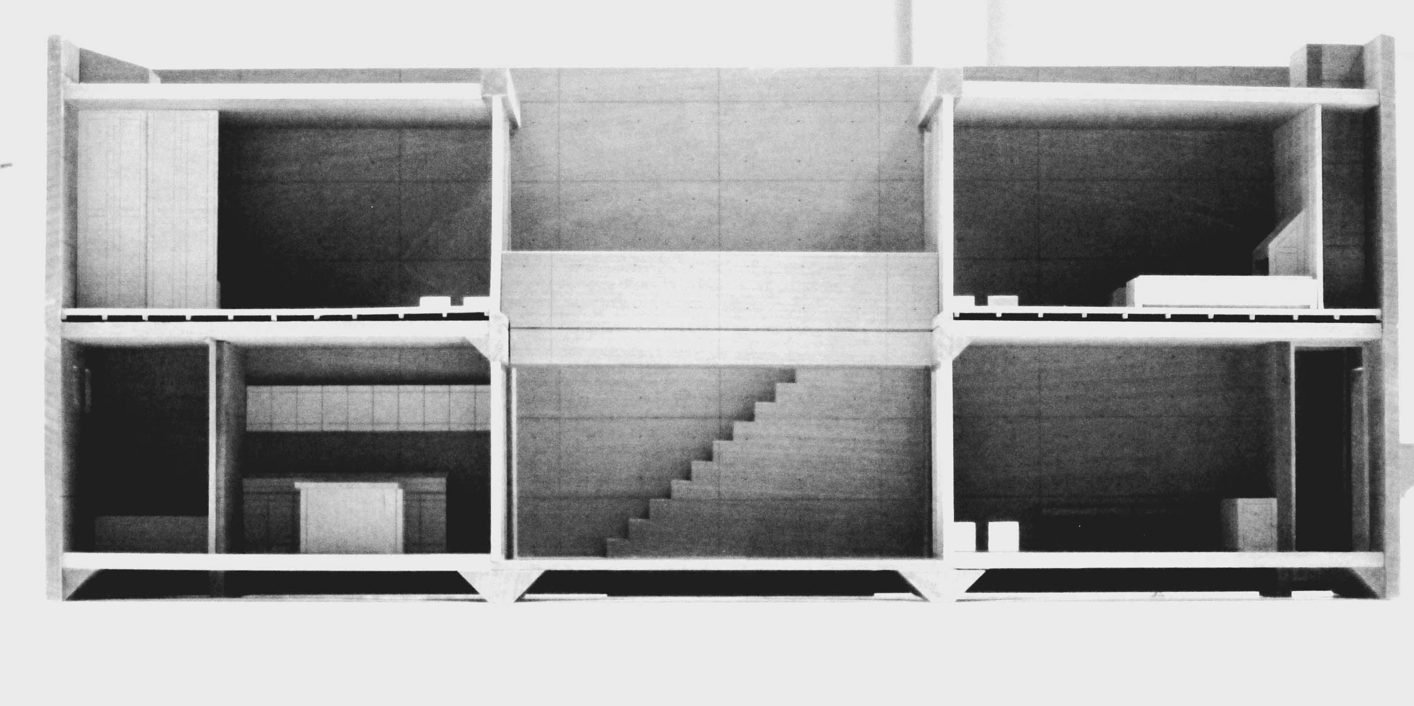 Διαμήκη τομή της κατοικίας